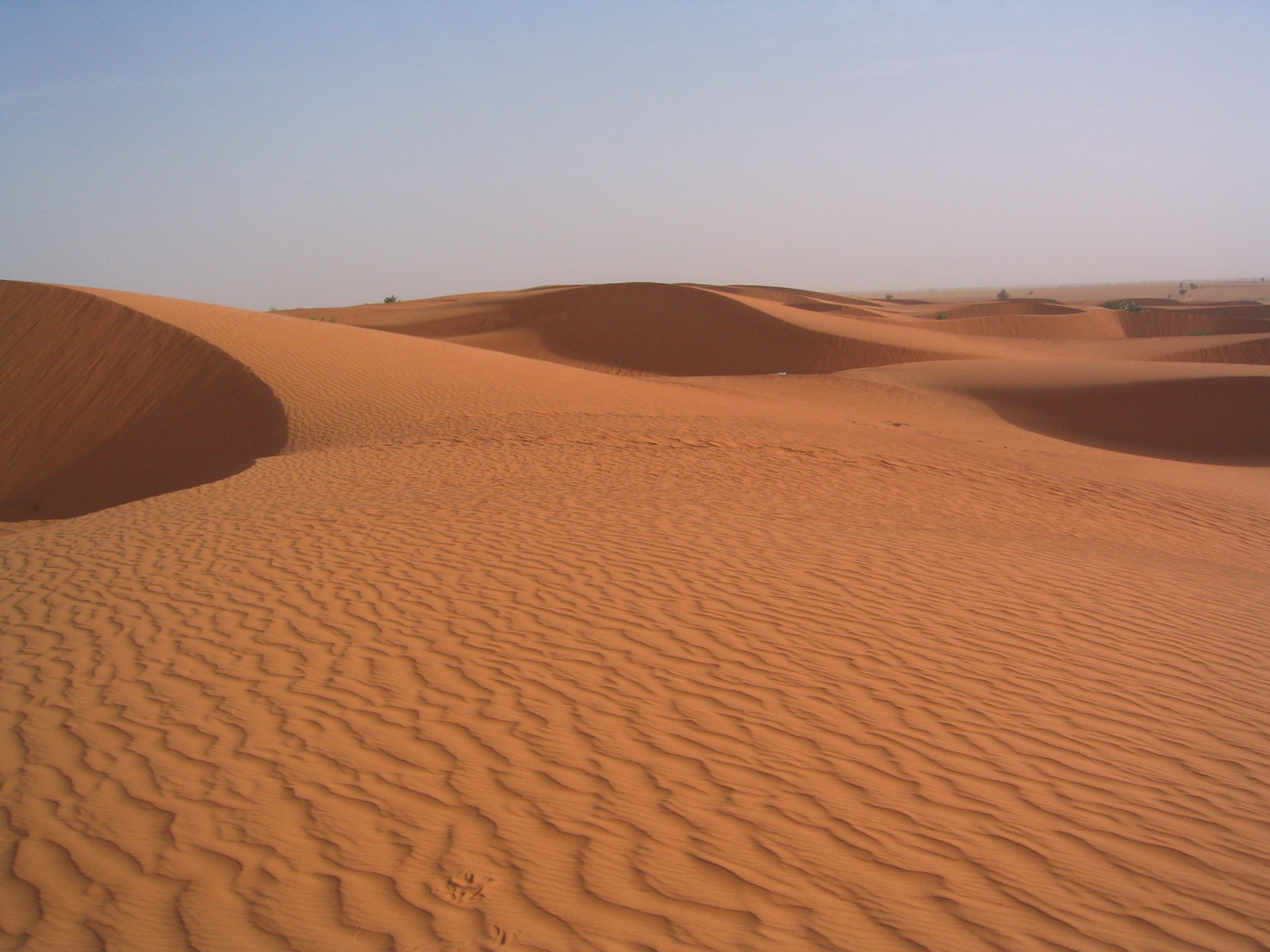 Dunes d'Ajouer dans le Trarza (Mauritanie)